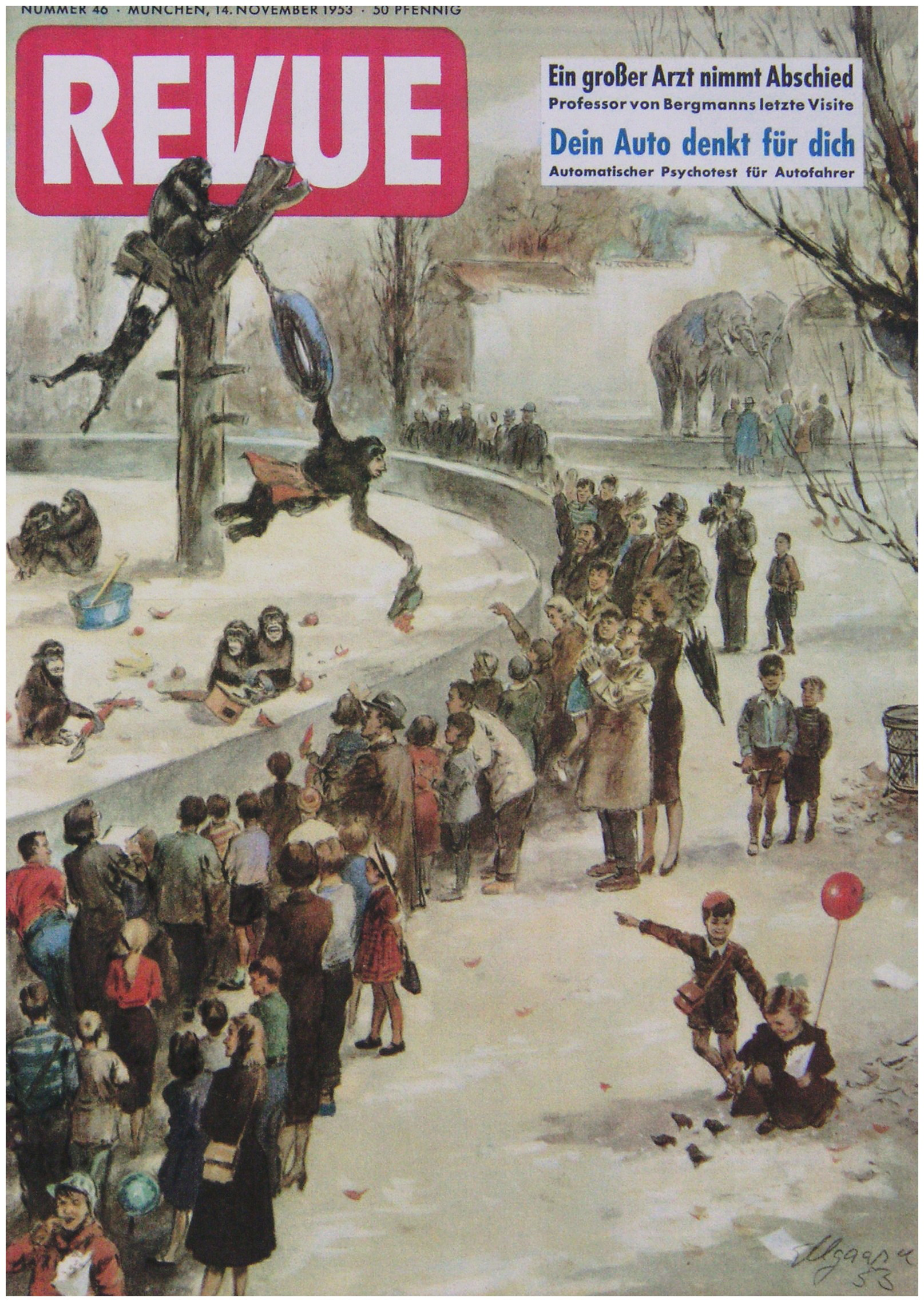 Titel für die Revue 1953